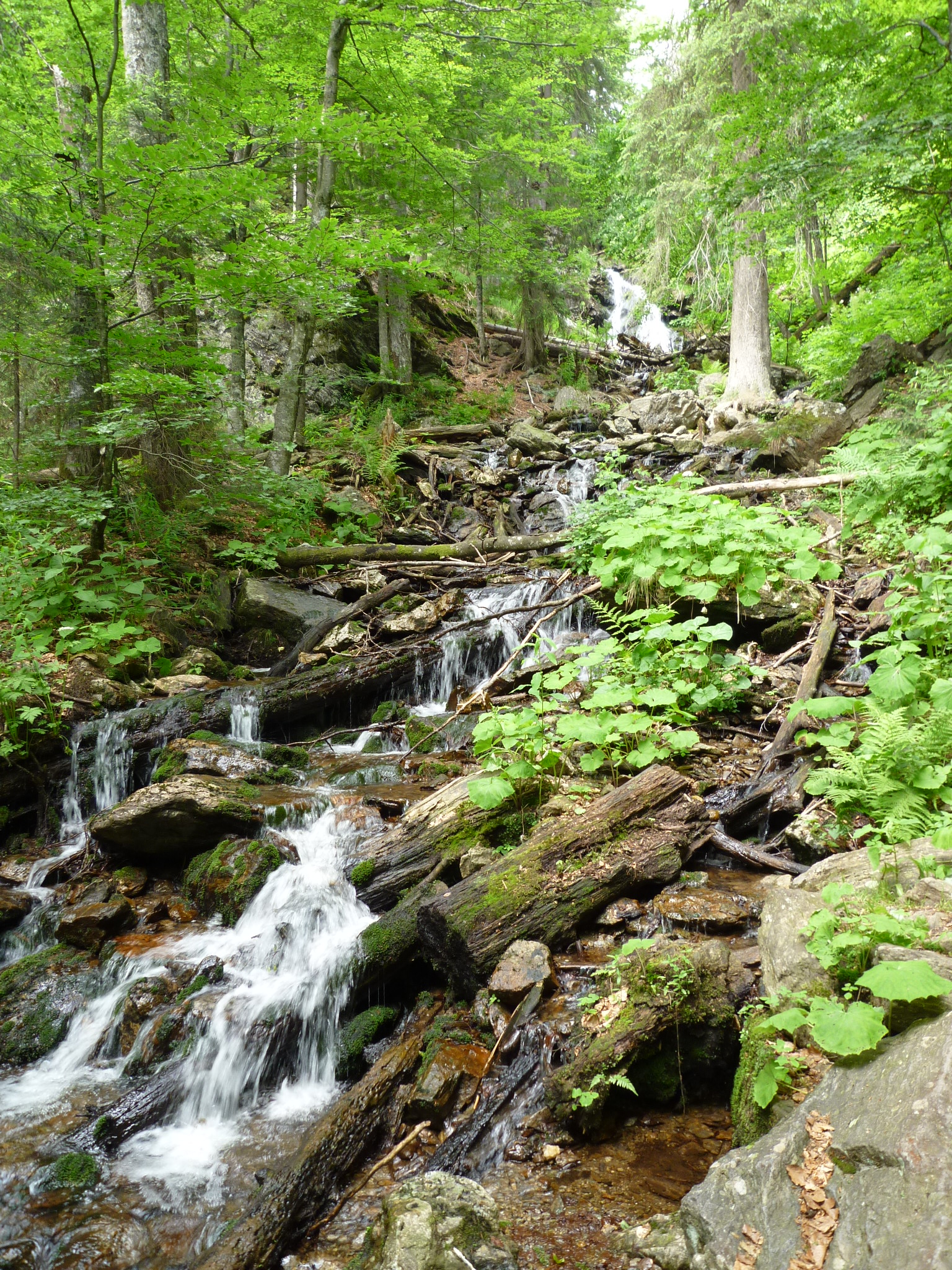 Das Höllbachgspreng ist eine gewaltige Urwaldregion, die man auf dem Wanderweg vom Großen Falkenstein in Richtung Höllbachschwelle, einem ehemaligen Trifftweiher erleben kann. Der Wanderweg passiert den rauschenden Höllbach, der auf einer steinigen Furt zu überqueren ist.